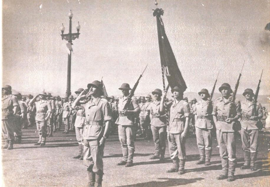 Bandeira Nacional da FEB, conduzida (em operações) pela Cia QG 1ª DIE